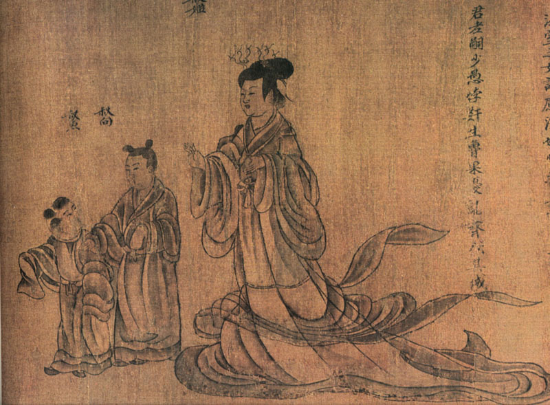 晉朝畫家顧凱之所作《列女仁智圖》中叔向、叔魚母子部分